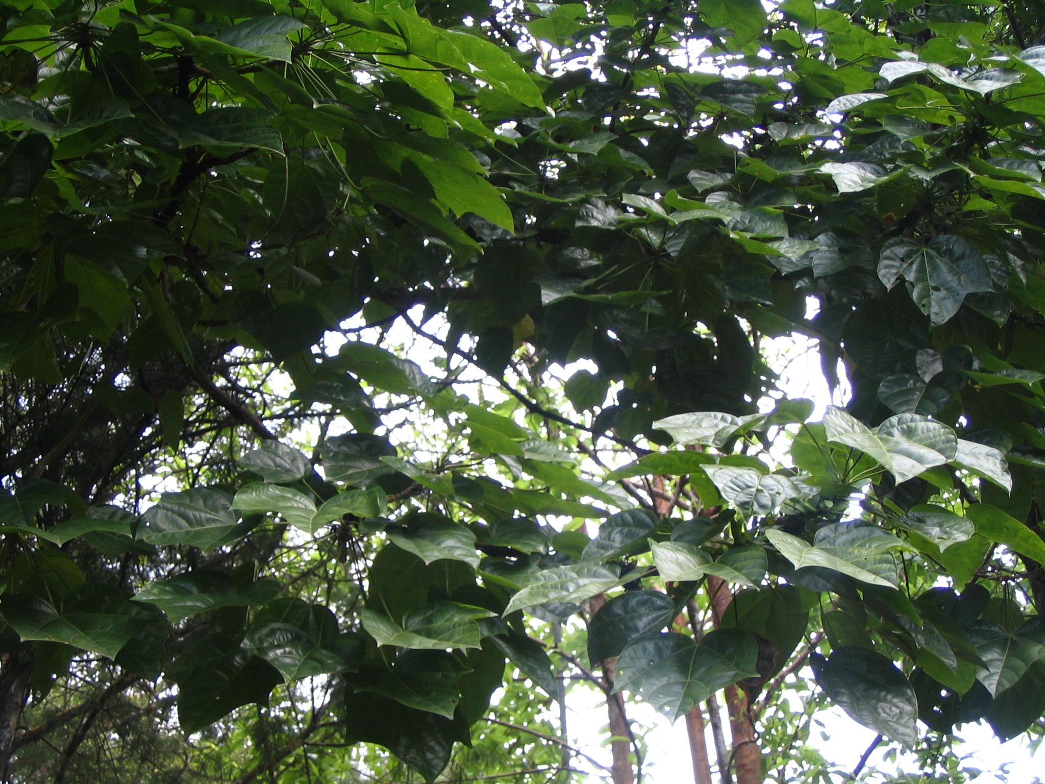 Firmiana malayana - planté au Forest Research Institute Malaysia , Kepong, Selangor.